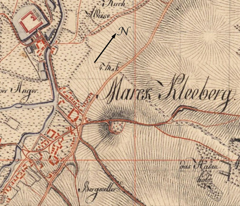 Karte von Markkleeberg um 1800 (Ausschnitt aus Meilenblätter von Sachsen 1780-1806)